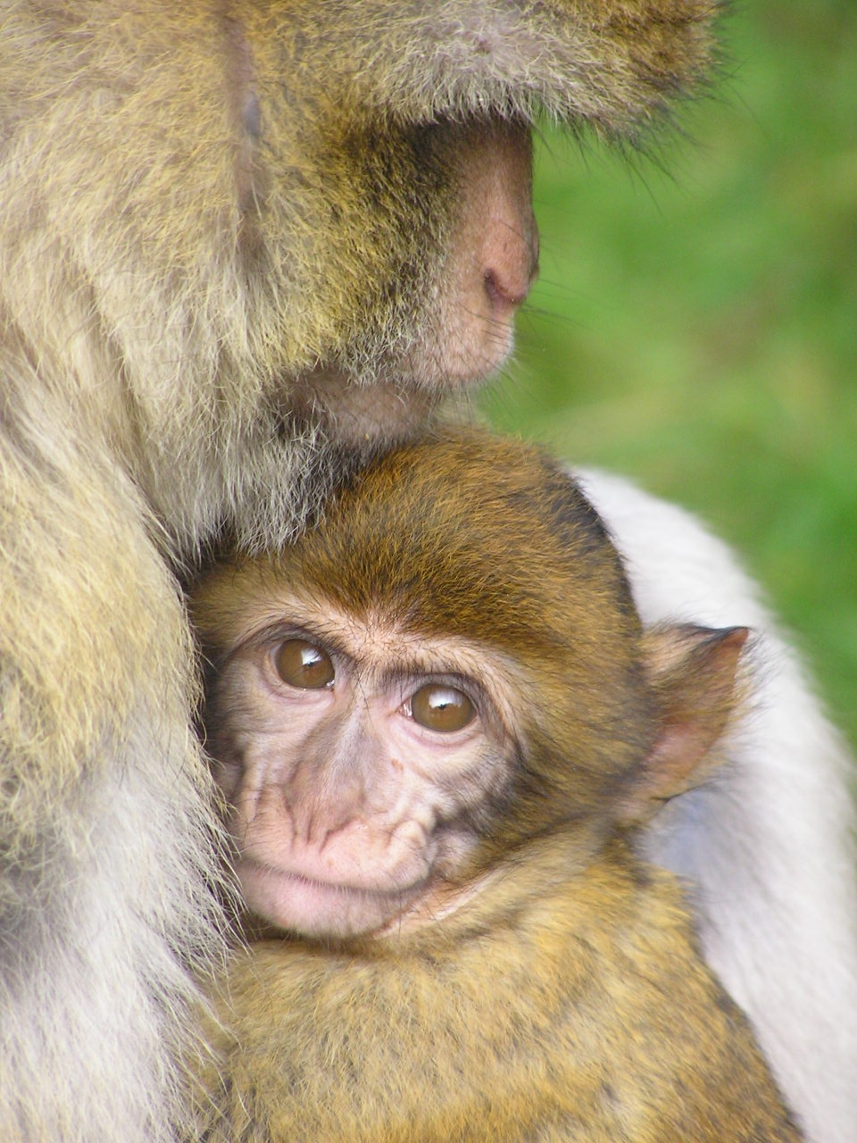 Photo from Apenheul Zoo, Antwerpen, Belgiumberberaapje